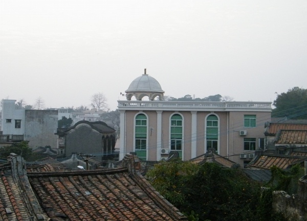 澳头天主堂 2010.1.29